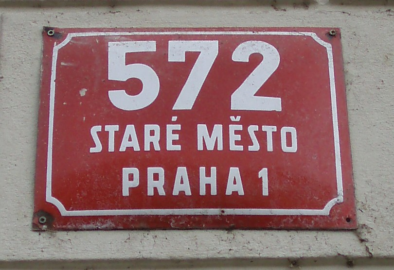 Číslo popisné v Praze/Number of a house in Prague